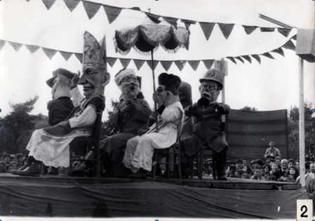 Karnevali Shkoder vitet 70